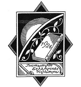 Зкслібрыс Інстытута беларускай культуры. Туш, пяро. Цынкаграфскае клішэ.